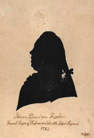 Johan Daniel Kreber (1719-1790), Danish general